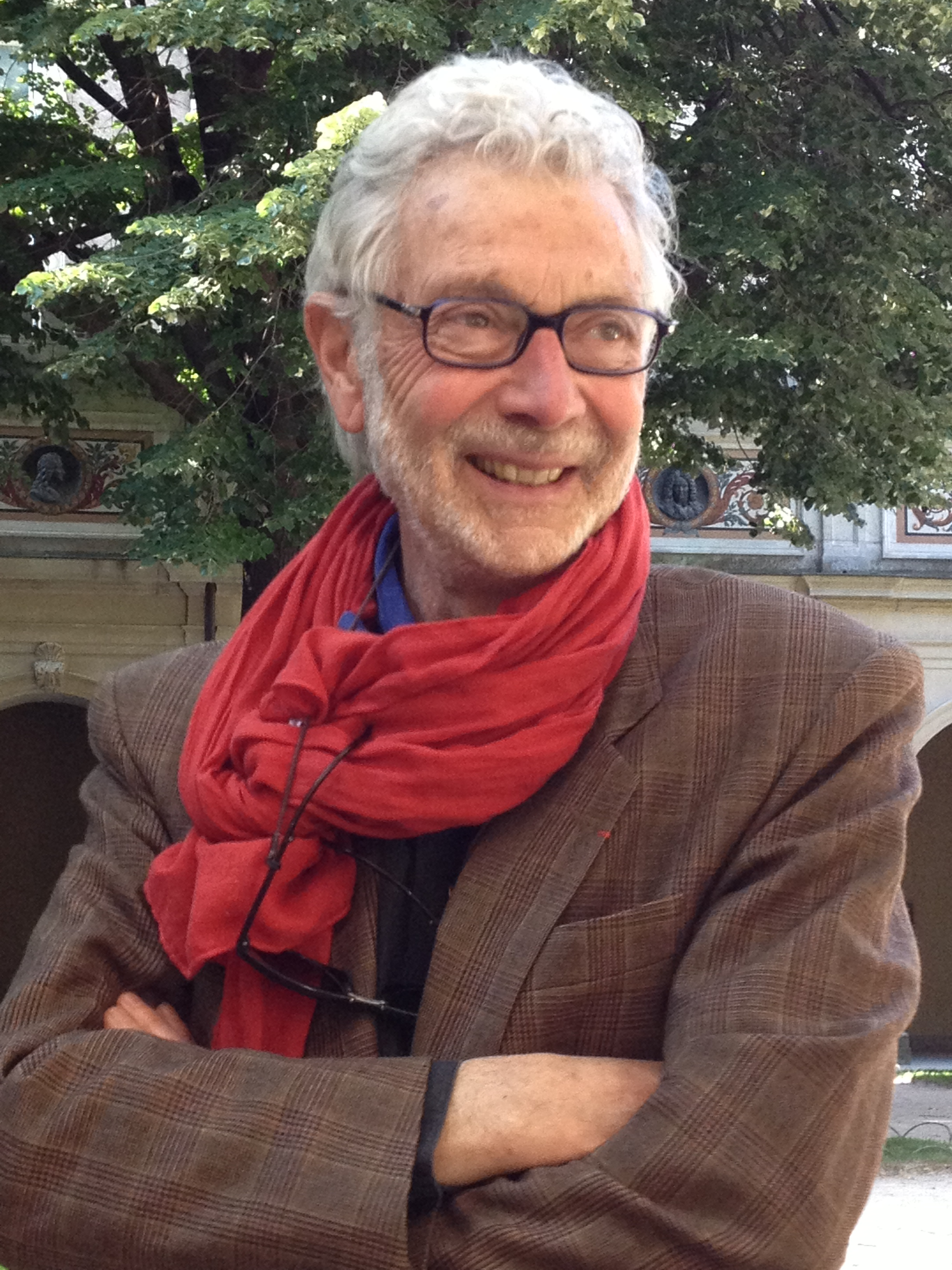 Pierre Buraglio Musée des Beaux-Arts de Lyon